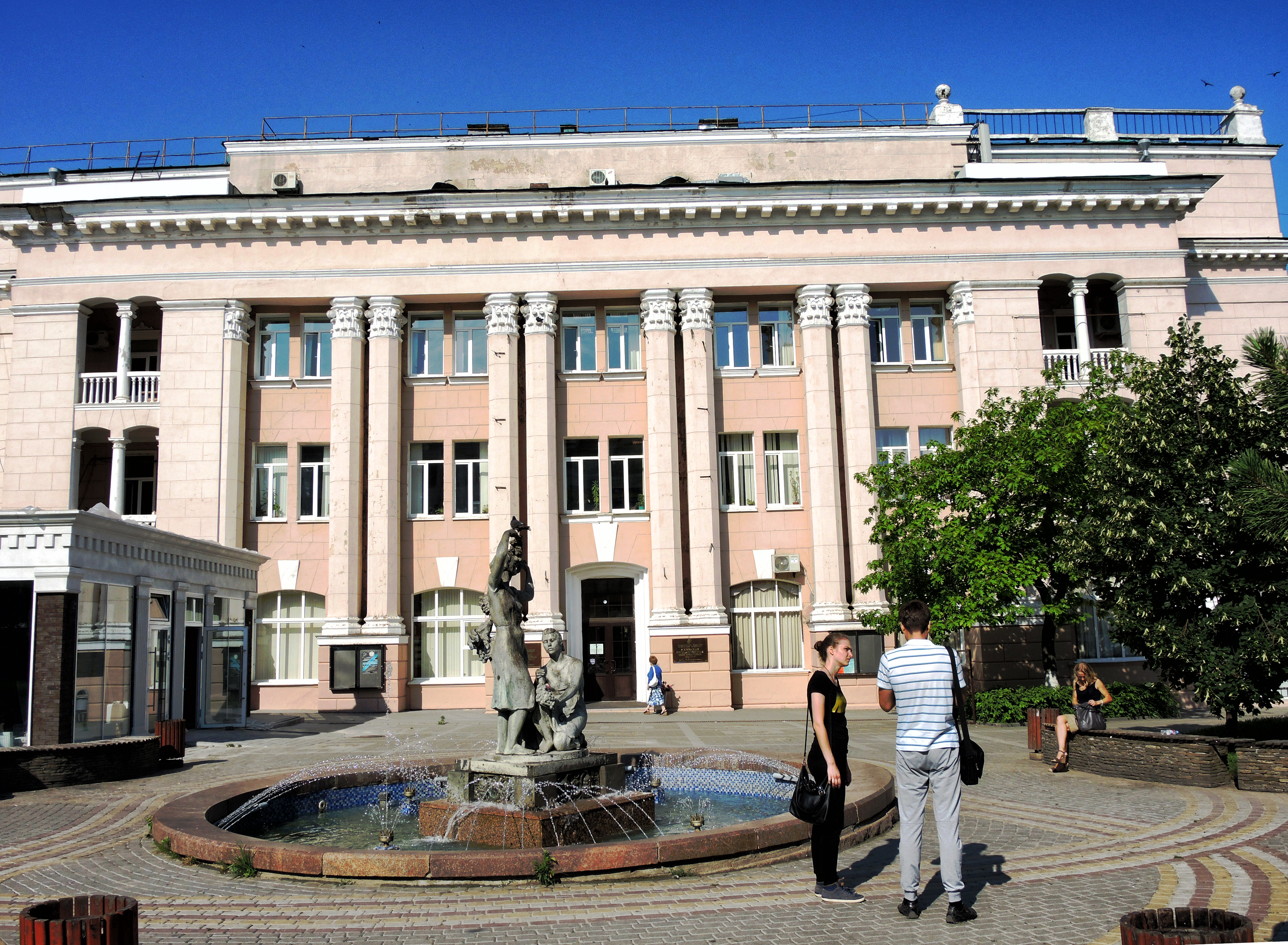 Ростовская Государственная консерватория имени С. В. Рахманинова: проспект Буденновский, 23, Ростов-на-Дону, Ростовская область